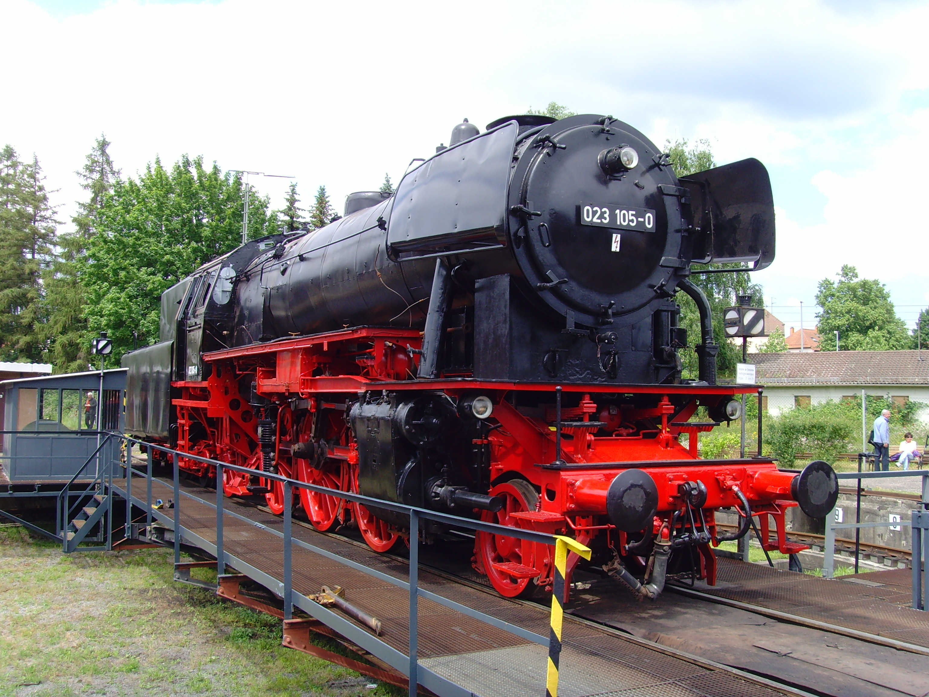 Süddeutsches Eisenbahnmuseum Heilbronn - Schnellzugloktreffen 046